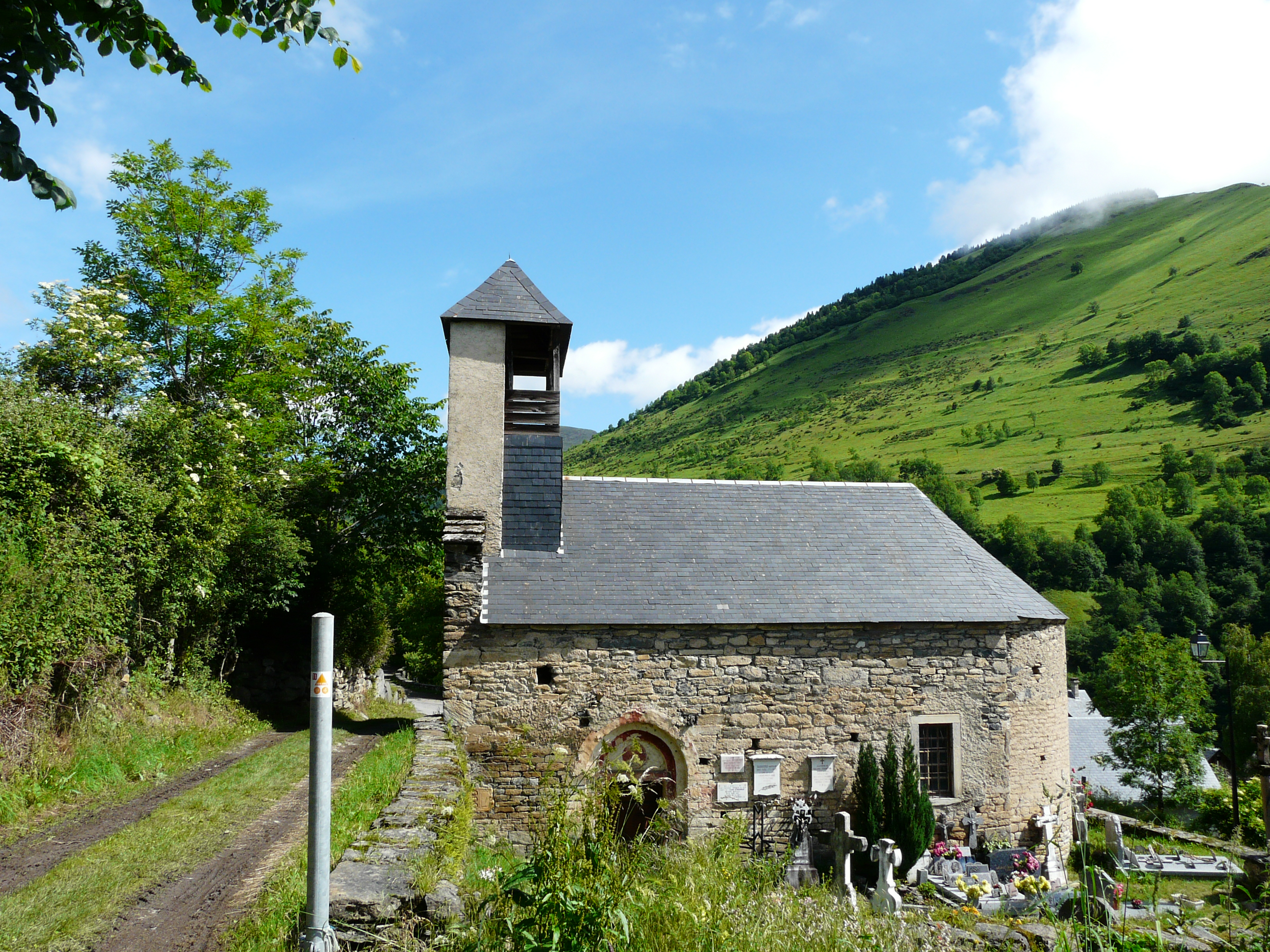 L'église Saint-Geniès de Benque-Dessous vue depuis le sud, Haute-Garonne, France.